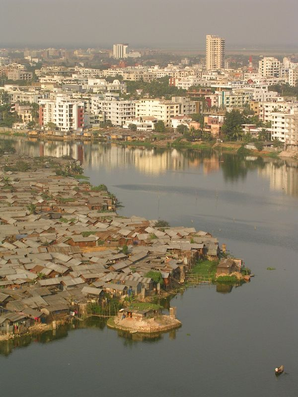 Bario, slum, Bangladesh.